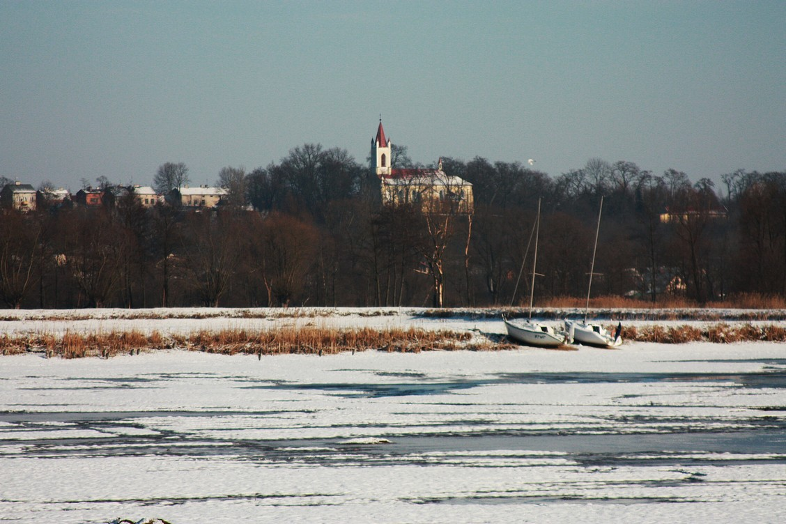 Kościół pw. Opieki Matki Boskiej Bolesnej w Nowym Mieście nad Pilicą, widok od strony stawów koło Wólki Magierowej, położonych w dolinie Pilicy